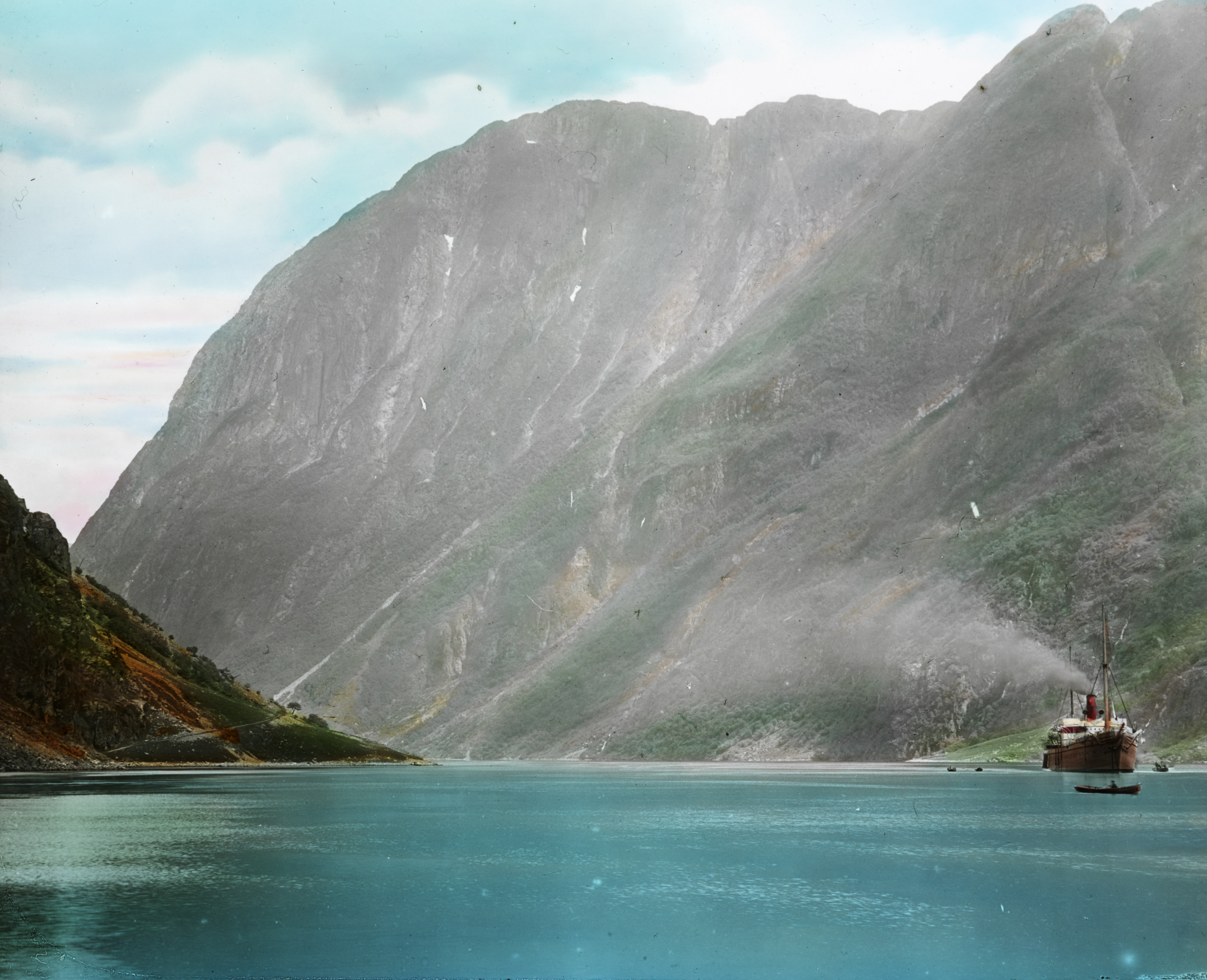 SFFf-1992078.0029 View of the Nærøyfjord from Gudvangen, Sogn.